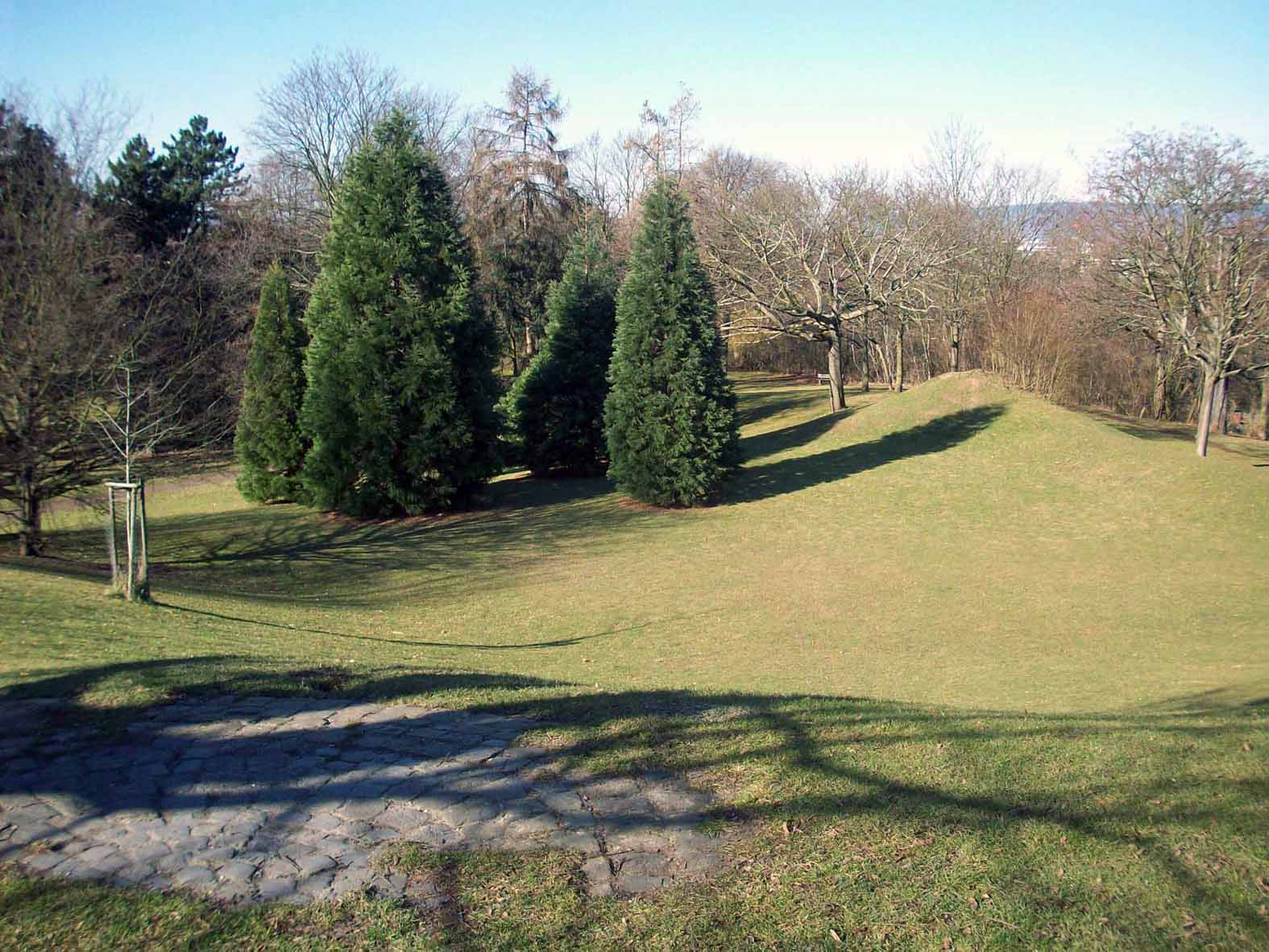 Blick vom Hügel über den Festungstrümmern in den Volkspark.